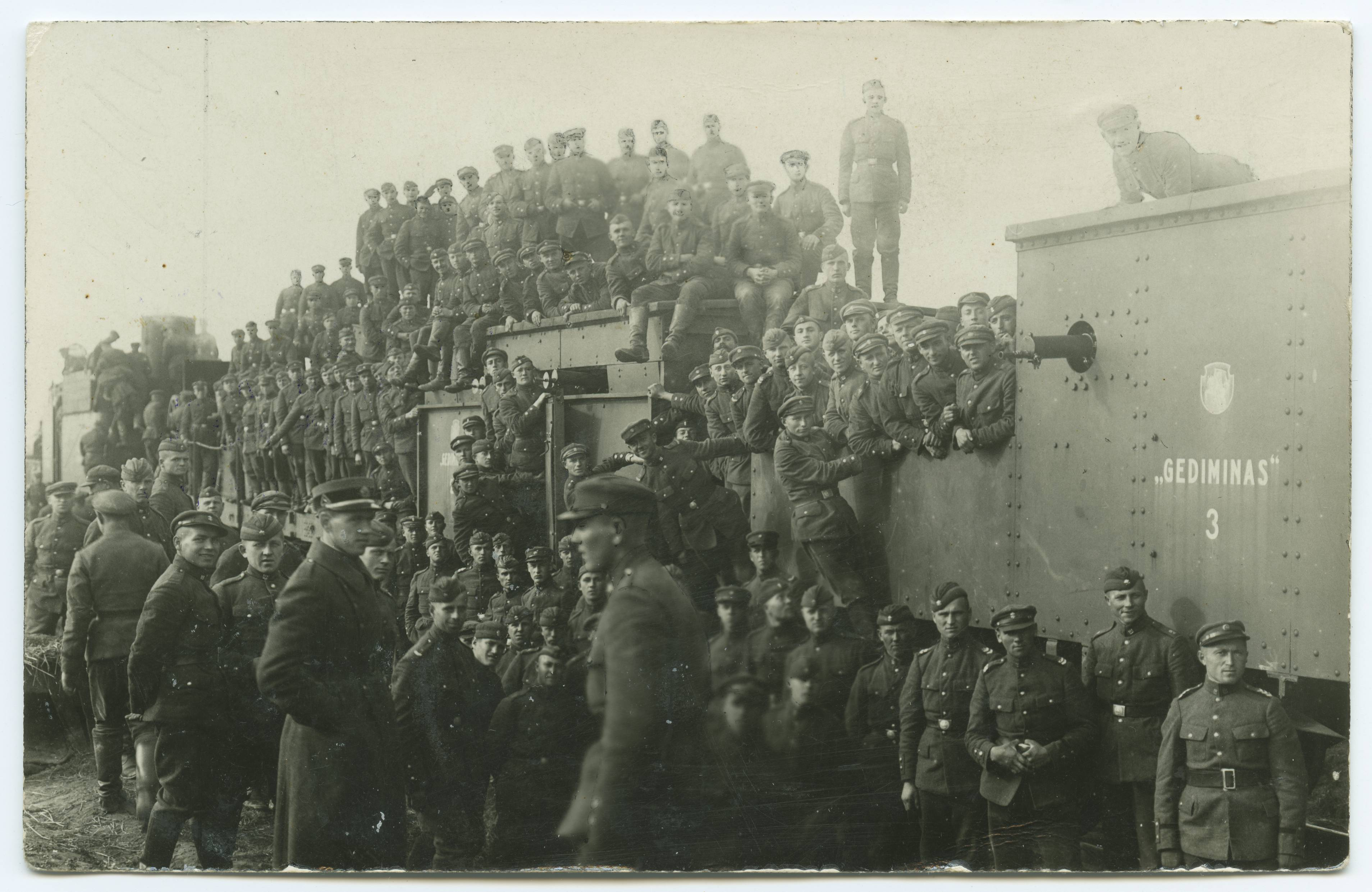 Lietuvos šarvuotas traukinys "Gediminas" 9 pėstininkų pulke